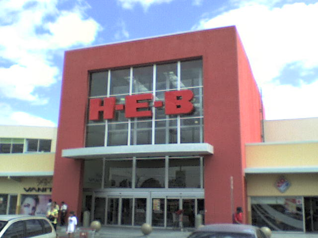 HEB Torreón